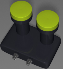 Są to dwa konwertery w jednej obudowie umieszczone obok siebie + wbudowany przełącznik DiSEqC. Konwerter ten zastępuje układ dwóch pojedynczych konwerterów zamontowanych w układzie zez (każdy konwerter odbiera sygnał z innego satelity).Konwerter ten stosuje się dla anten średnicy 80-90 cm , w Polsce dla satelit HotBird i Astra. Konwerter ten obsługuje dwa dekodery dając im niezależny sygnał z dwóch satelit. Konwerter ten podobnie jak twin ma dwa wyjścia .Przełączanie satelity oraz zakresów i polaryzacji jest sterowane przez odbiornik.